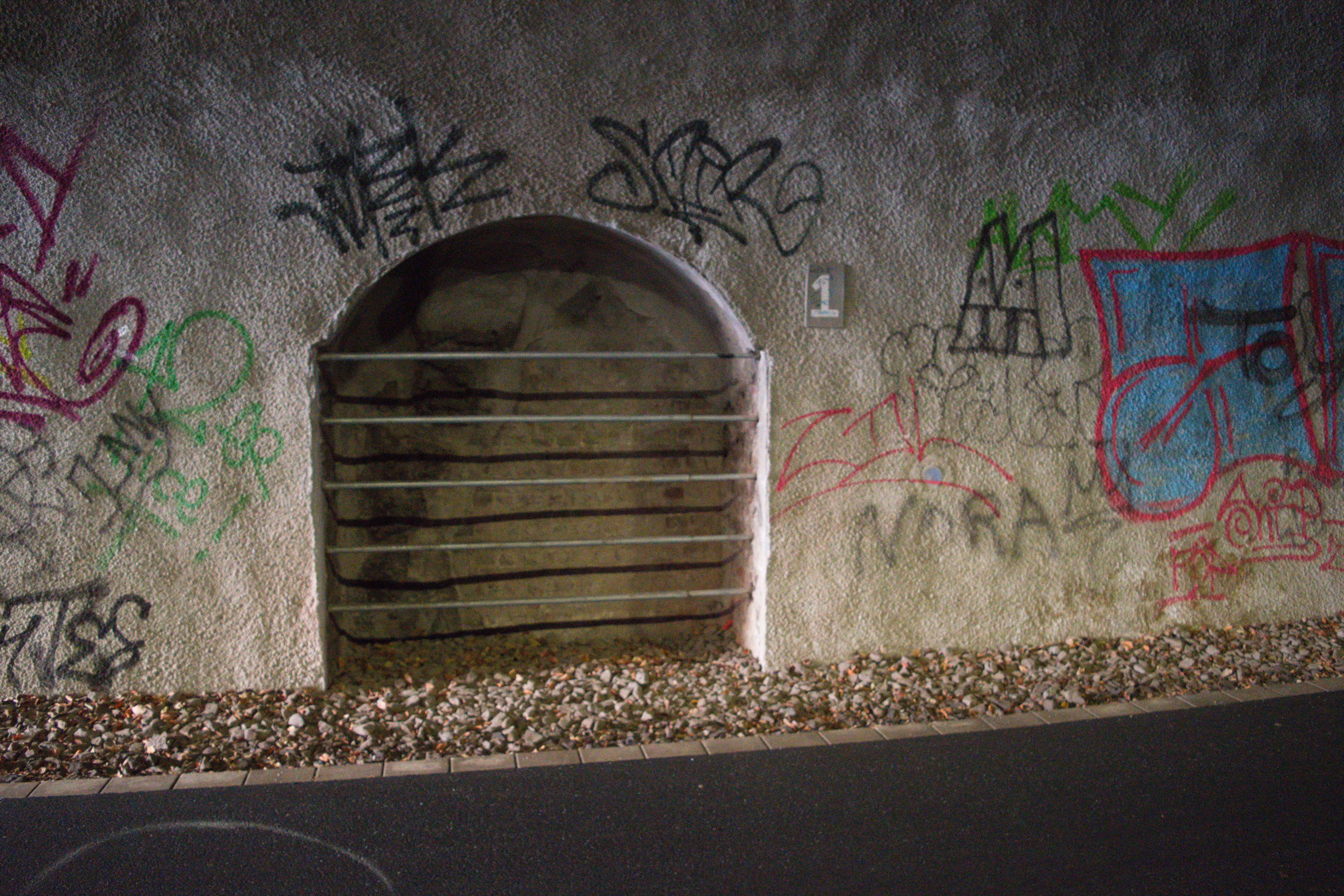 Eintrachtstraße, Wuppertal